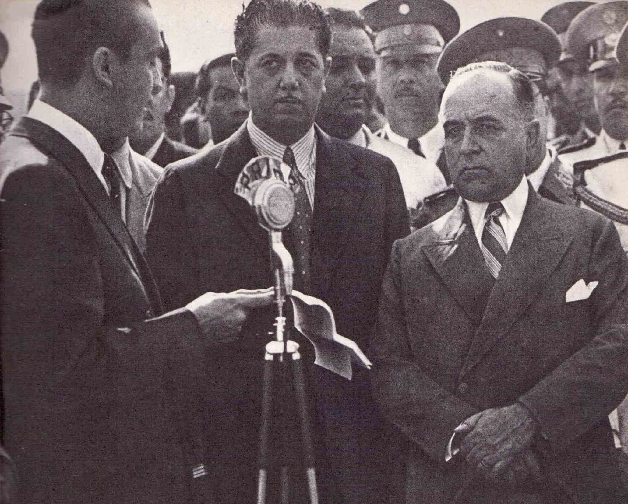 Juscelino Kubitschek discursando para Benedito Valadares e Getúlio Vargas, durante a inauguração da Avenida do Contorno (Belo Horizonte), em 12 de maio de 1940.